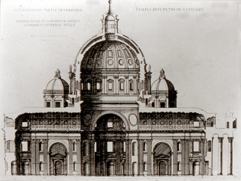 Étienne du Pérac (Dupérac): sezione di San Pietro in Vaticano secondo il progetto attribuito a Michelangelo